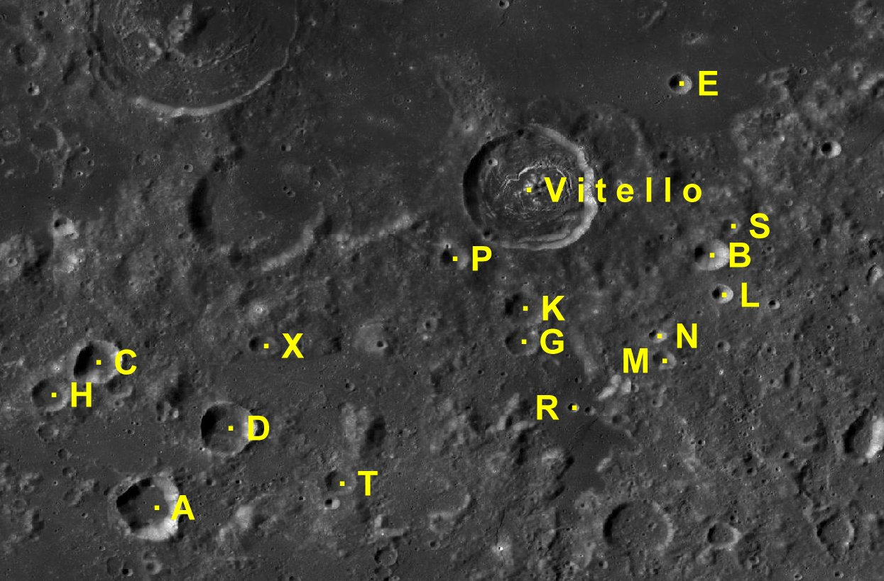 Cráter lunar Vitello. Cráteres satélite. (Imagen LRO)